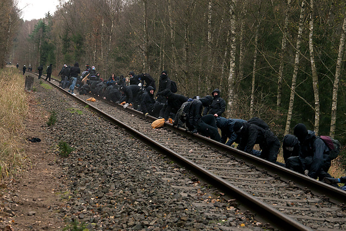 Castor 2011: Schottern